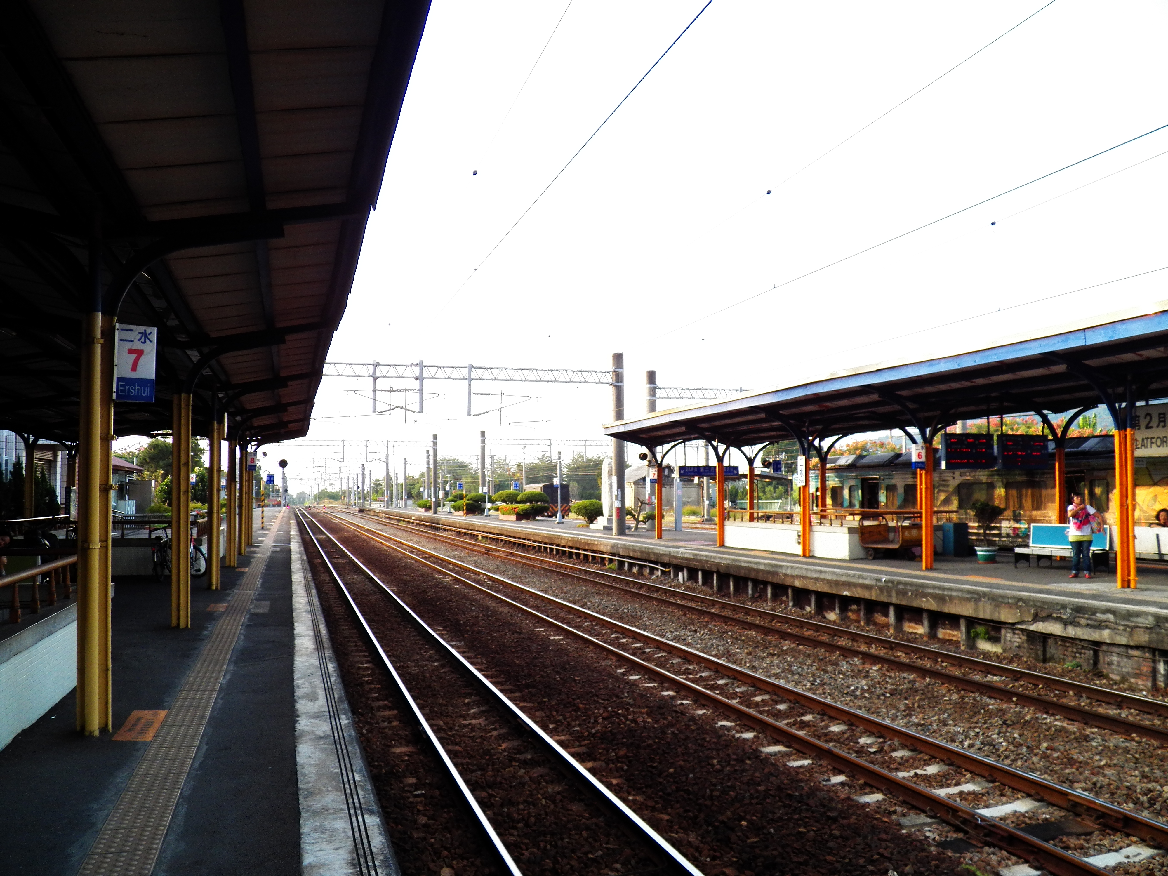 由二水車站第一月臺北望站內臺中方面。第二月臺有列車停靠。